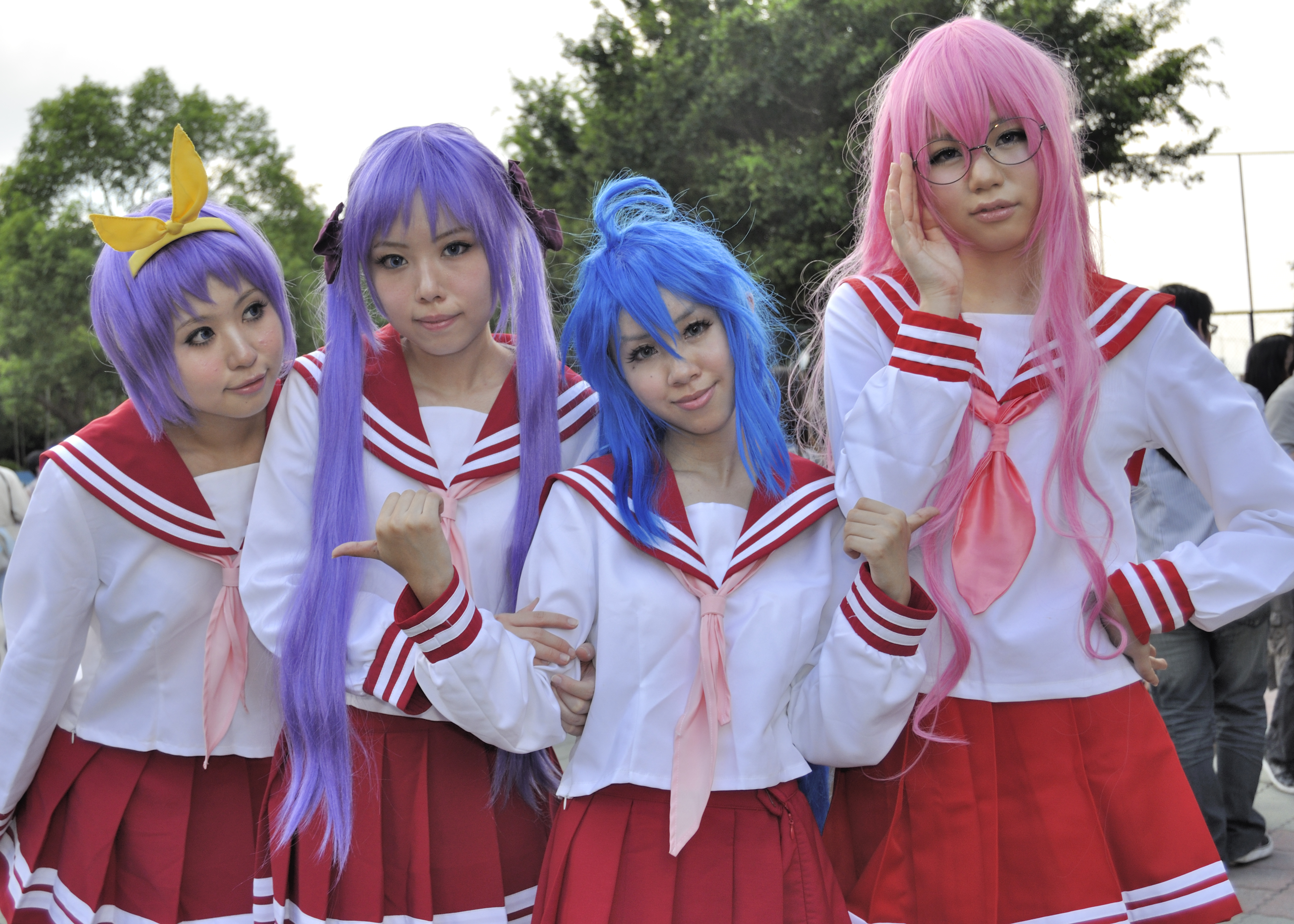 第18屆開拓動漫祭，《幸運☆星》柊司、柊鏡、泉此方、高良美幸cosplayer。